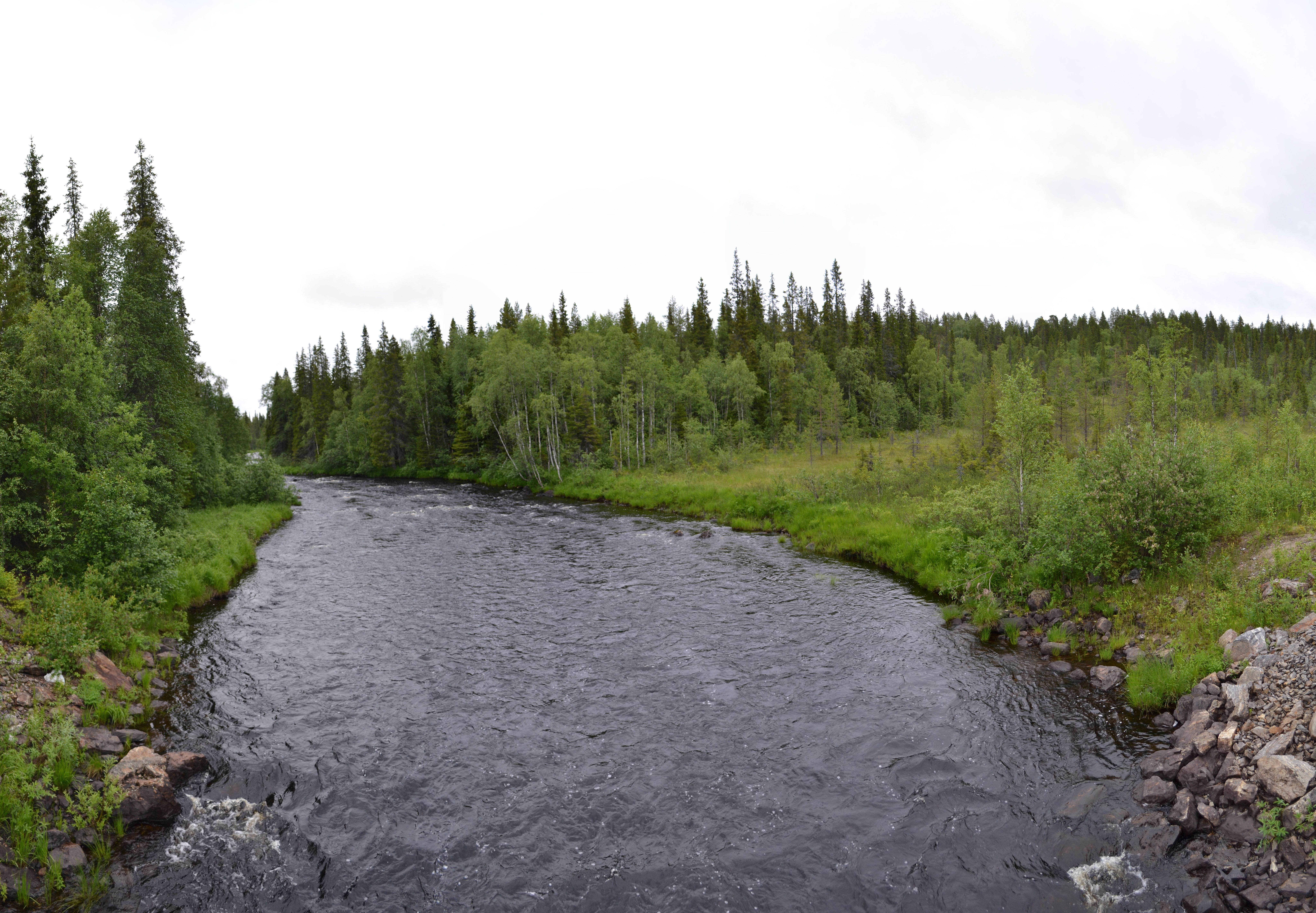 Река Пила с моста. Июль 2012